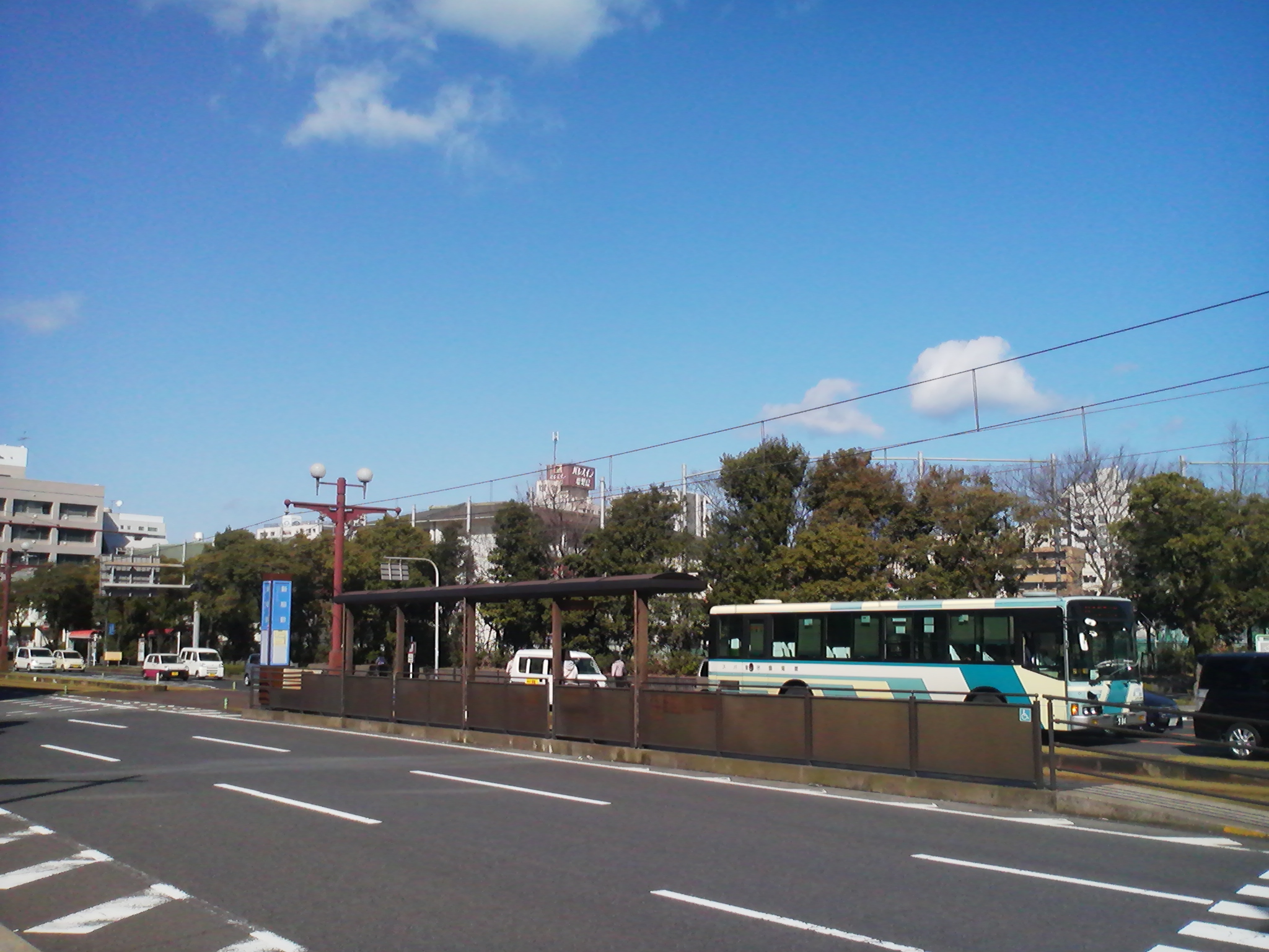 鹿児島市電新屋敷電停の画像。